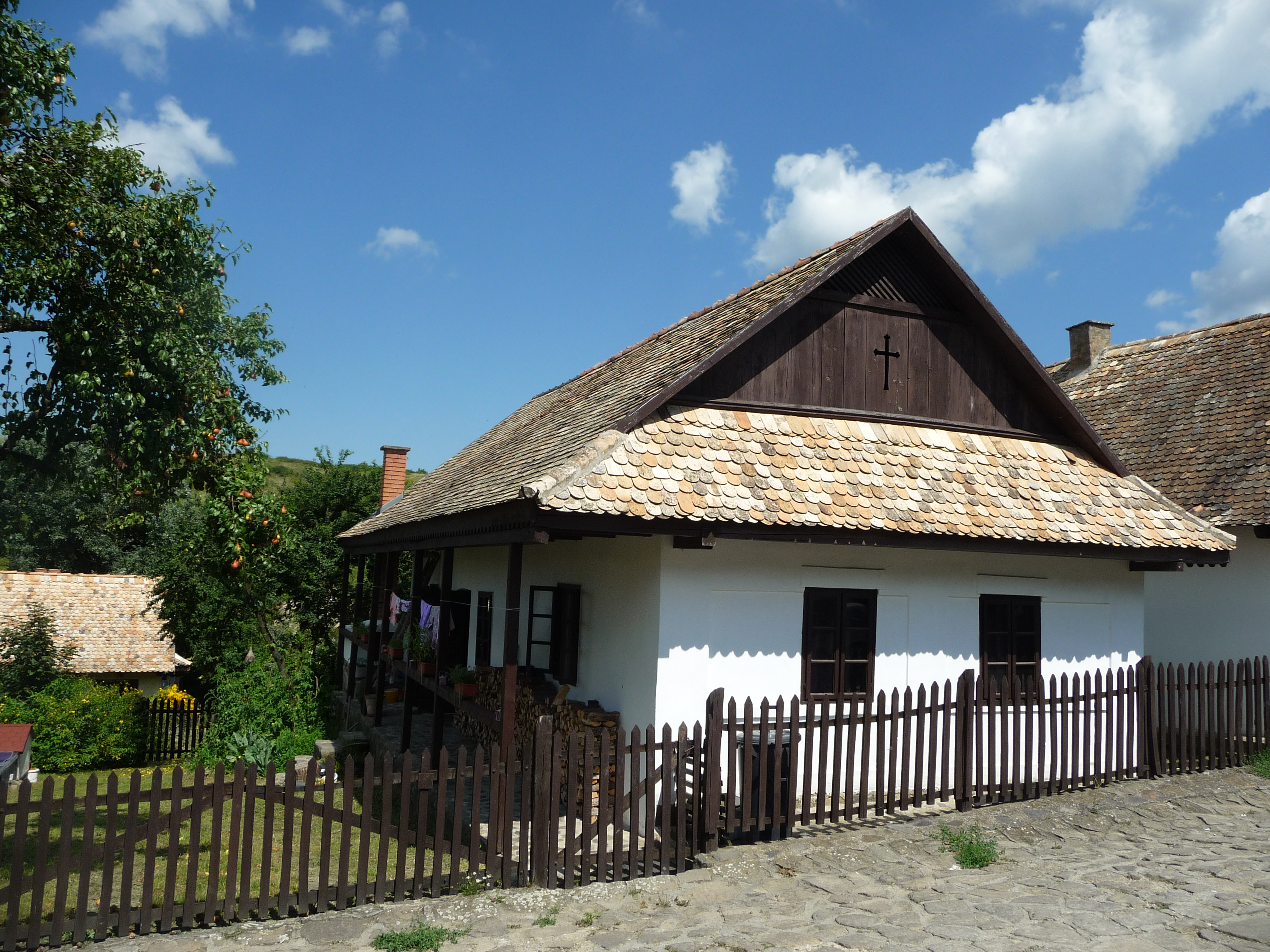 Hollókő, Kossuth u. 90.